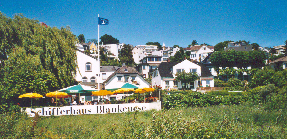 Aufnahme 18. Juni 2005, Blankenese Strand. Fotograf Peter Berger (selbst fotografiert). Lizenzstatus "GNU-FDL"